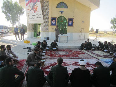 مراسم ختم قران توسط بسیجیان در صحن امام زاده ابراهیم